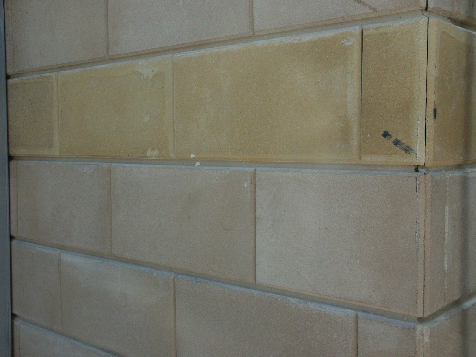 a façade from silicate brikes. חזית דקורטיבית מלבני חול סיד (סיליקט)